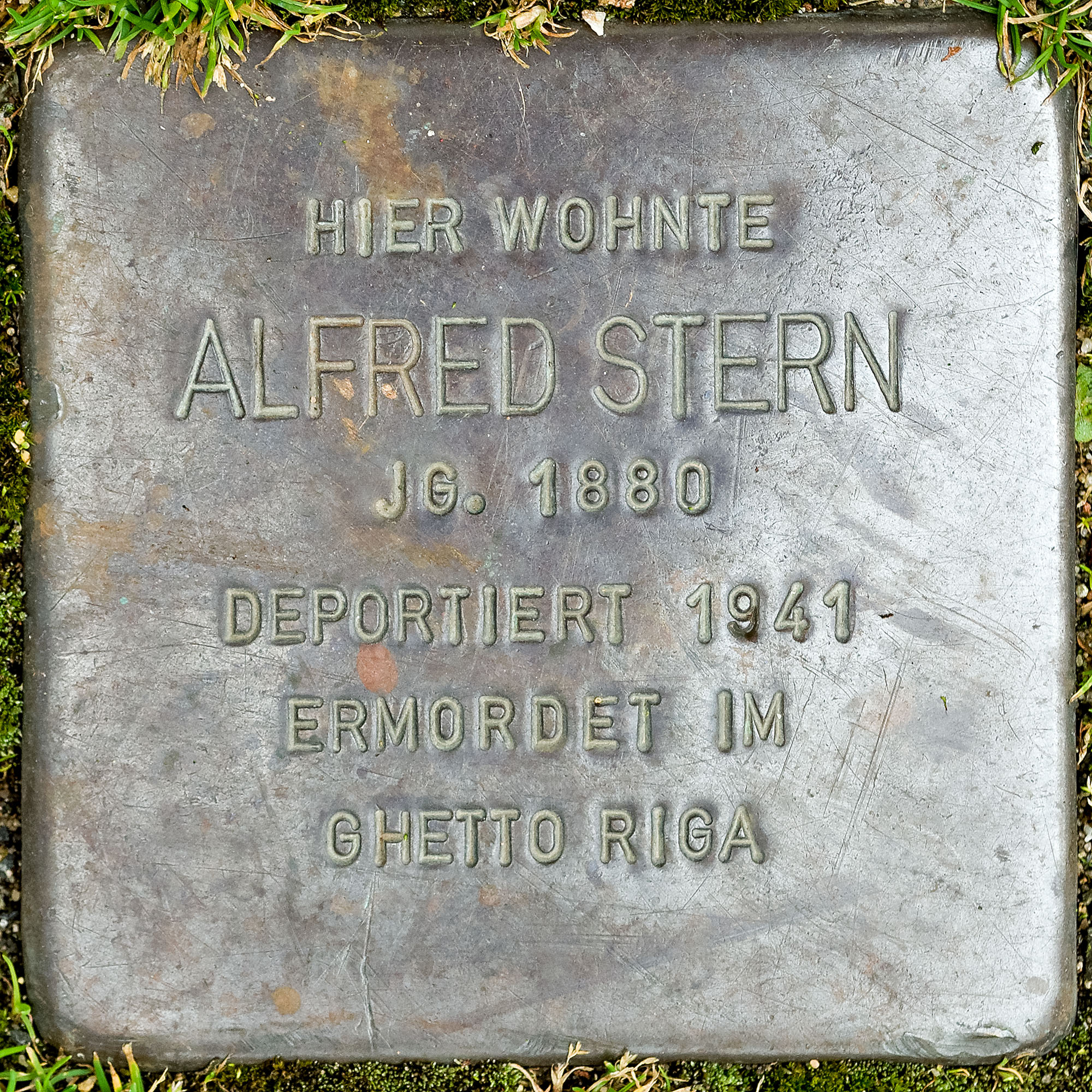 Stolpersteine in Viersen: Stern, Alfred